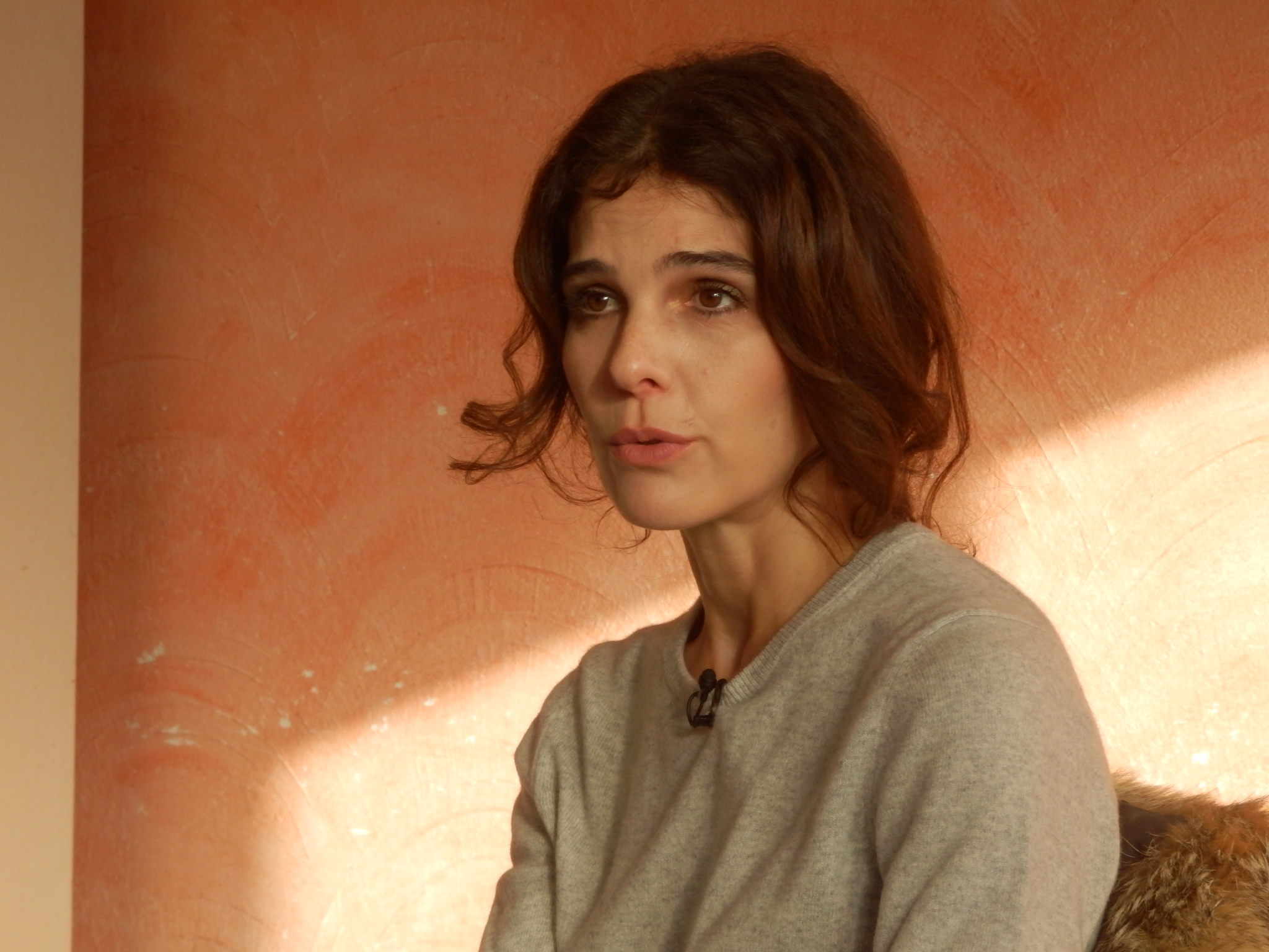 Claire Castillon, rencontre au lycée Maurice-Genevoix pour le prix L'Échappée littéraire 2018.